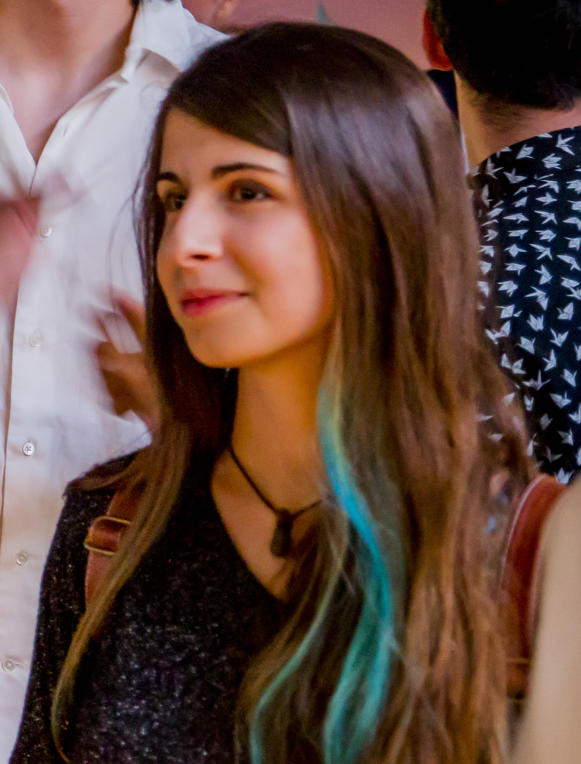 Tudor Laurini (Klaus), Andrea Hakimi (Homyatol) e Francesca Presentini (Fraffrog) alla Inaugurazione della Blasteem House.